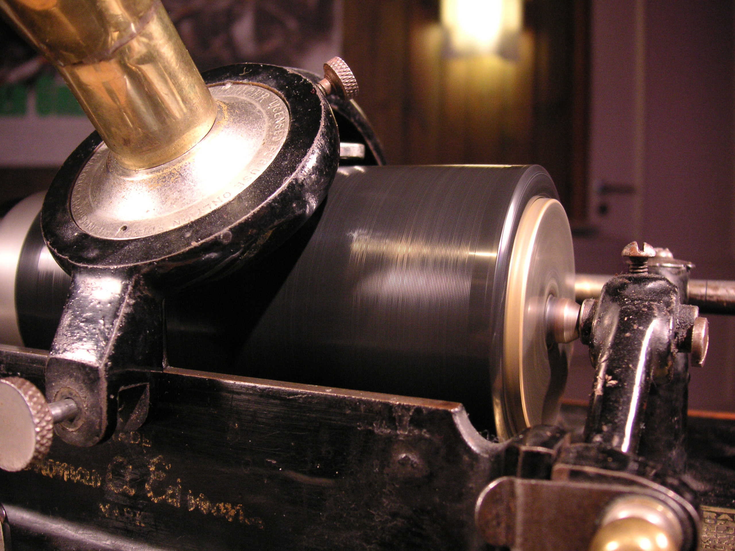 Fonograf